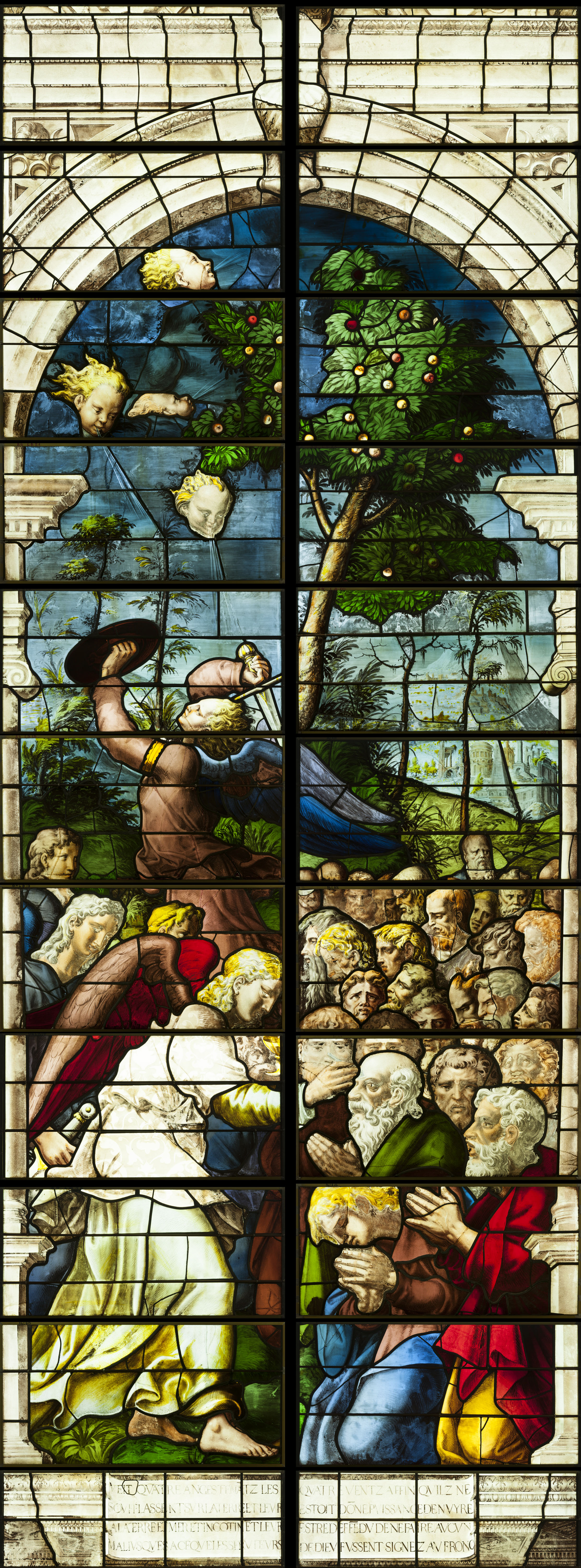 Vitrail